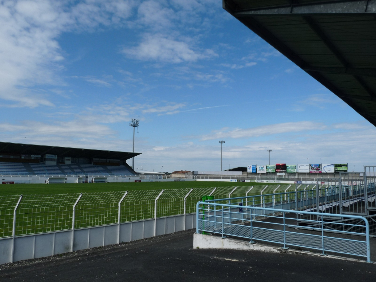 Stade Lebon, Angoulême, France